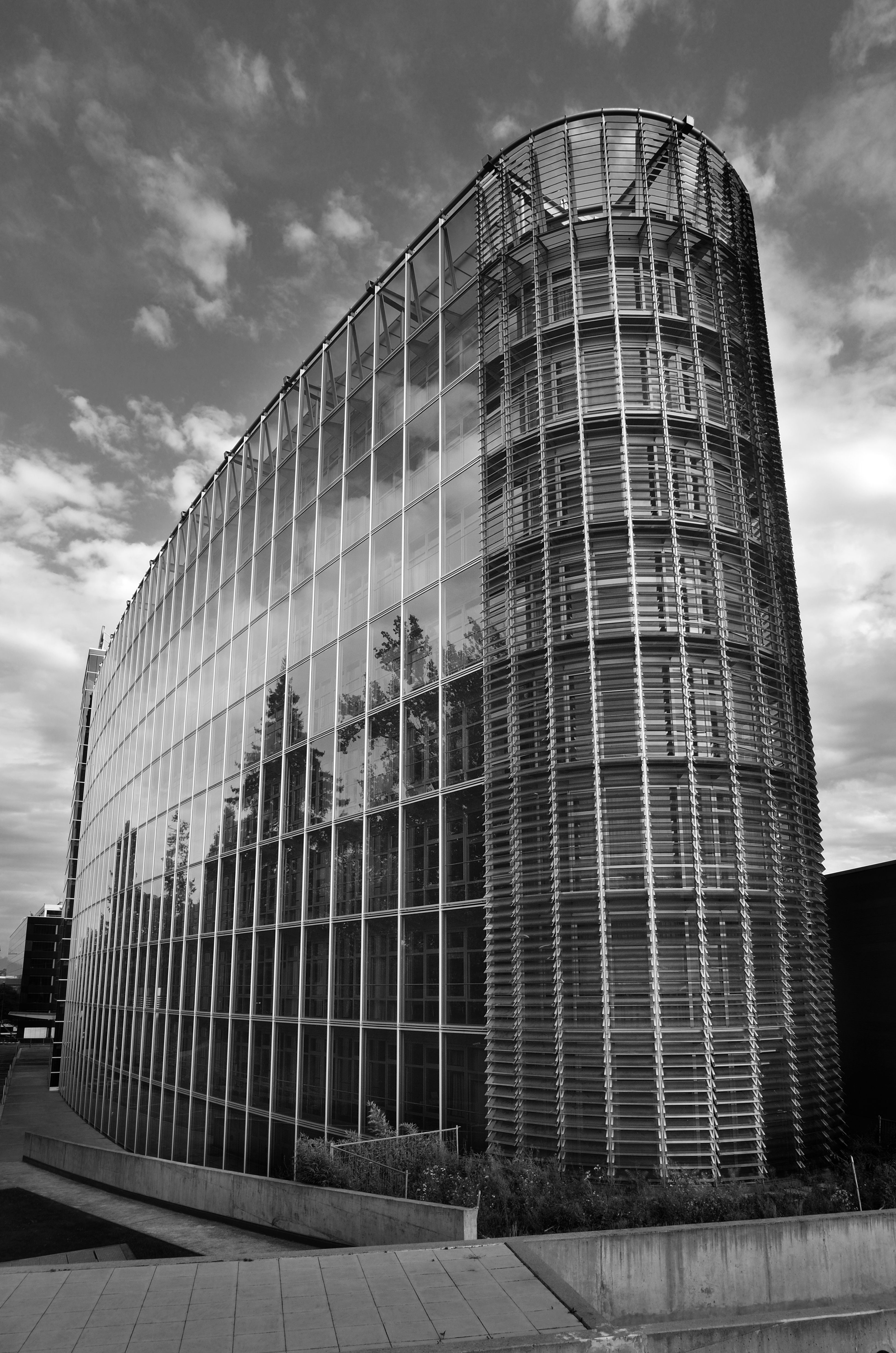 Organisation météorologique mondiale (Genève, Suisse)